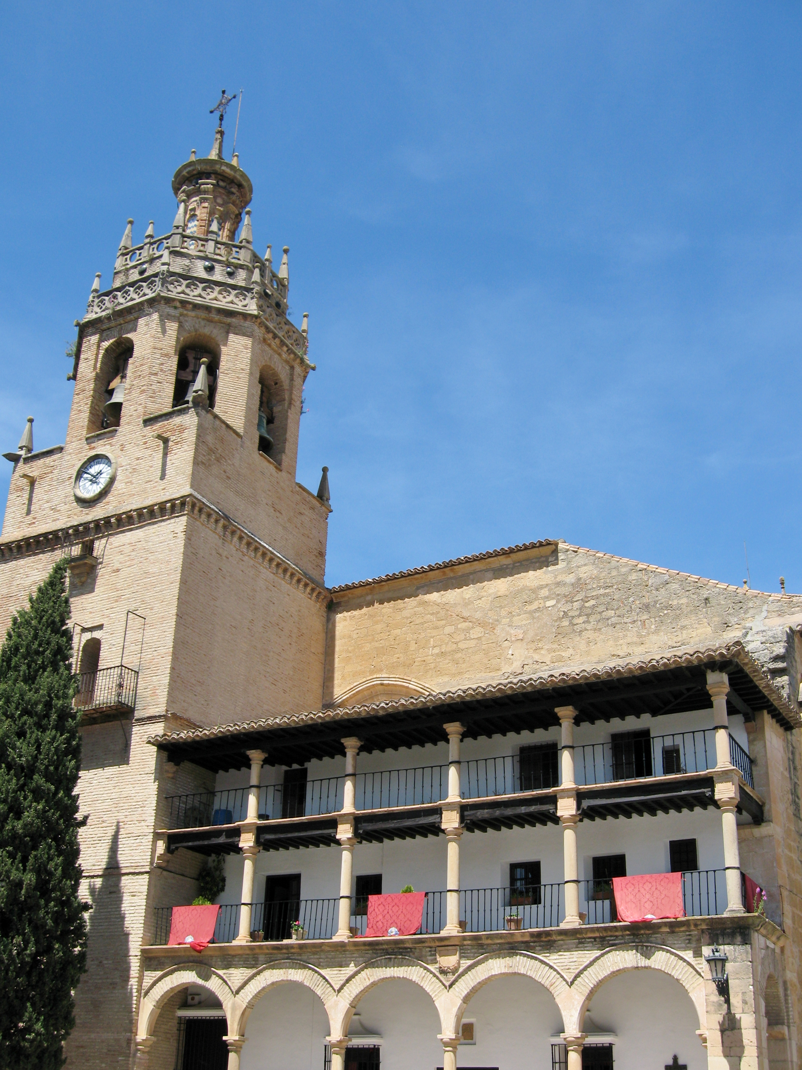 Kirche „Santa María la Mayor“, Ronda, Provinz Málaga, Andalusien, Spanien